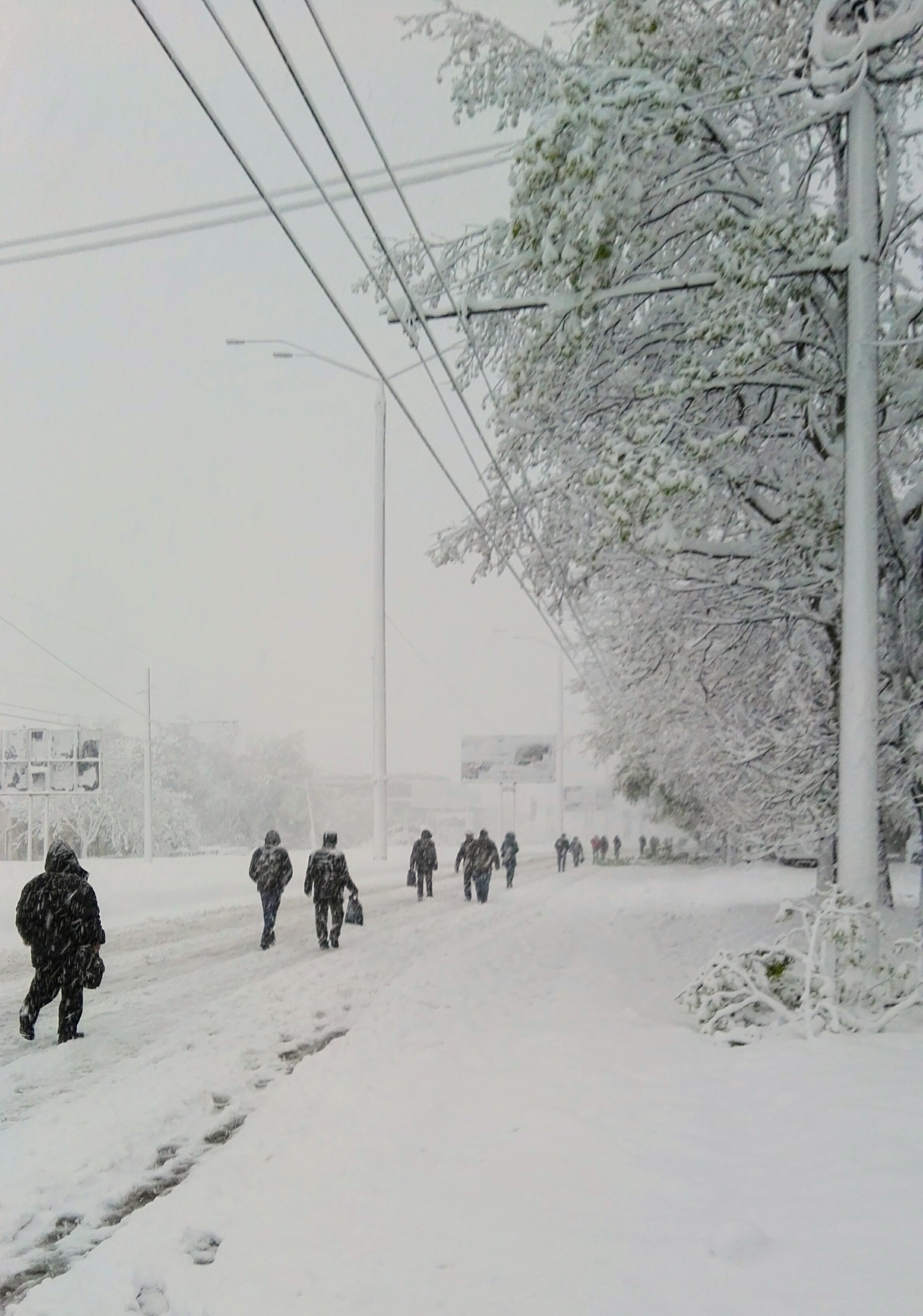 Imaginea arata pietonii care merg pe carosabil in timpul furtunii de zapada din aprilie 2017 in Chisinau, in timp ce traficul e paralizat.